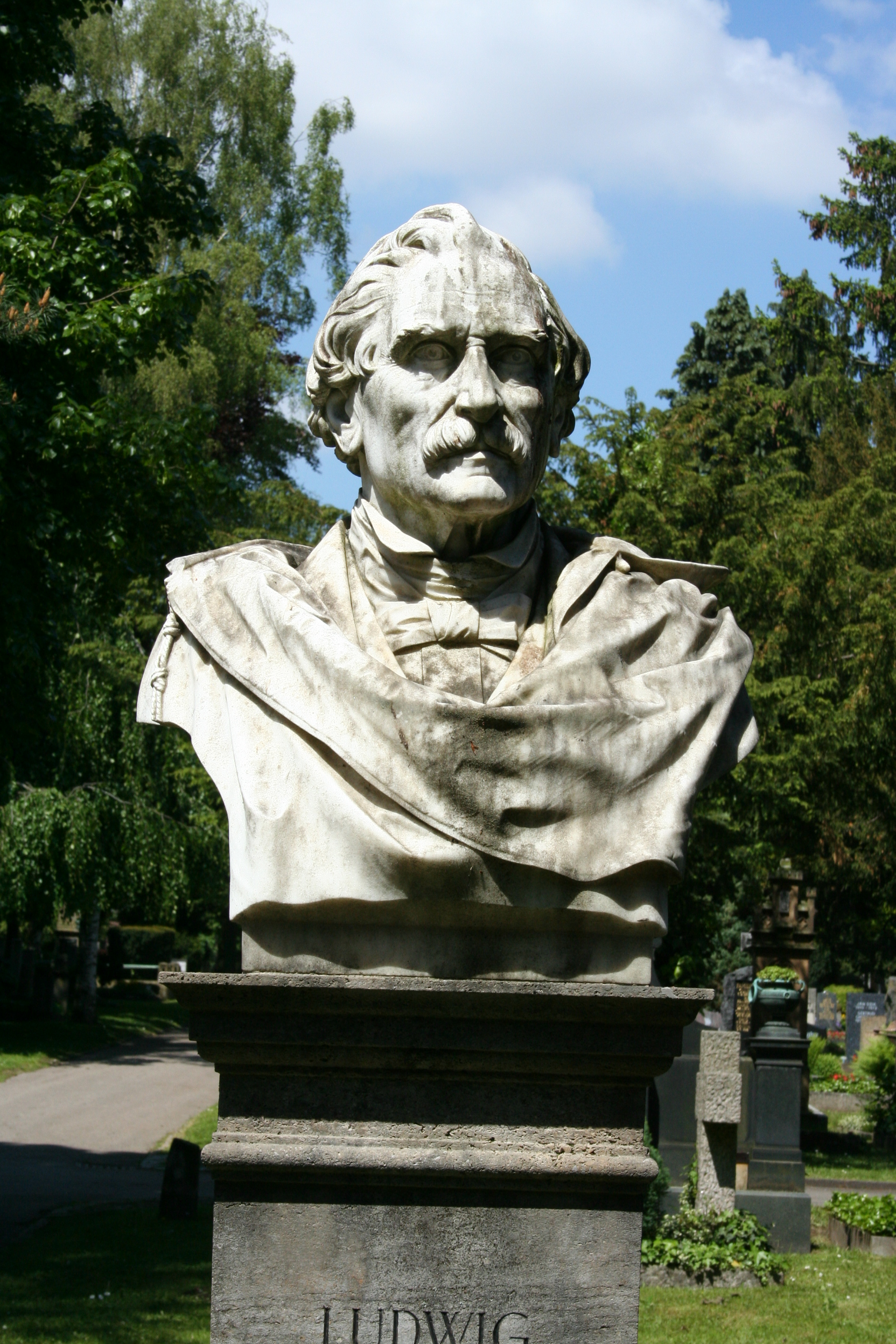 Grab von Ludwig Hofer auf dem Pragfiedhof in Stuttgart, Büste